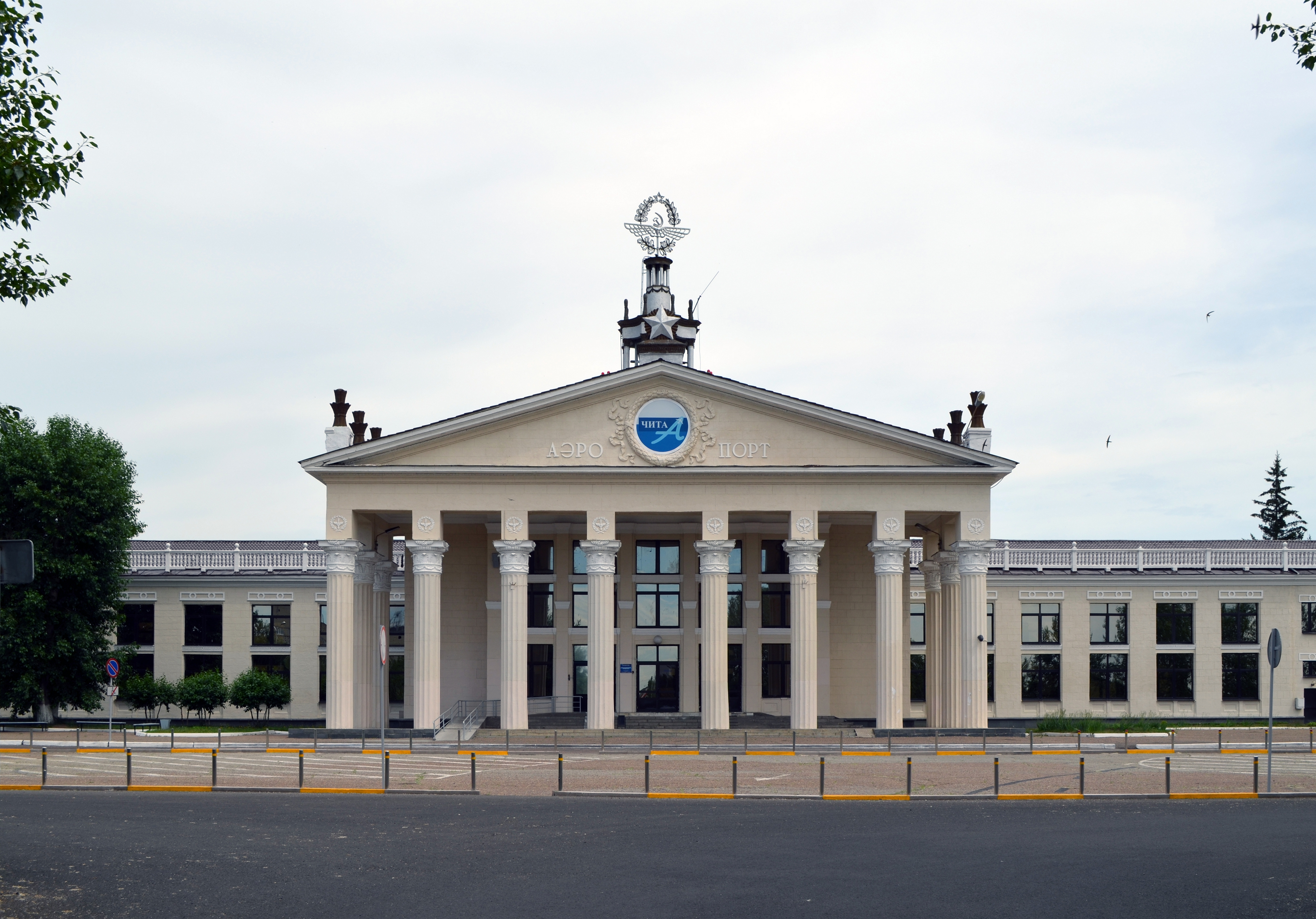 снимки конца июня - начала июля 2015 г.